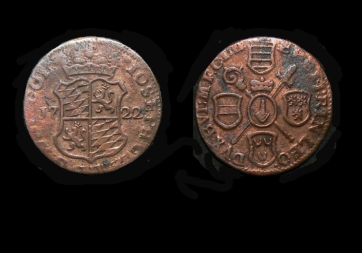 Monnaie de bronze liégeoise du Prince Evêque Joseph Clément de Bavière. Chestret 666.